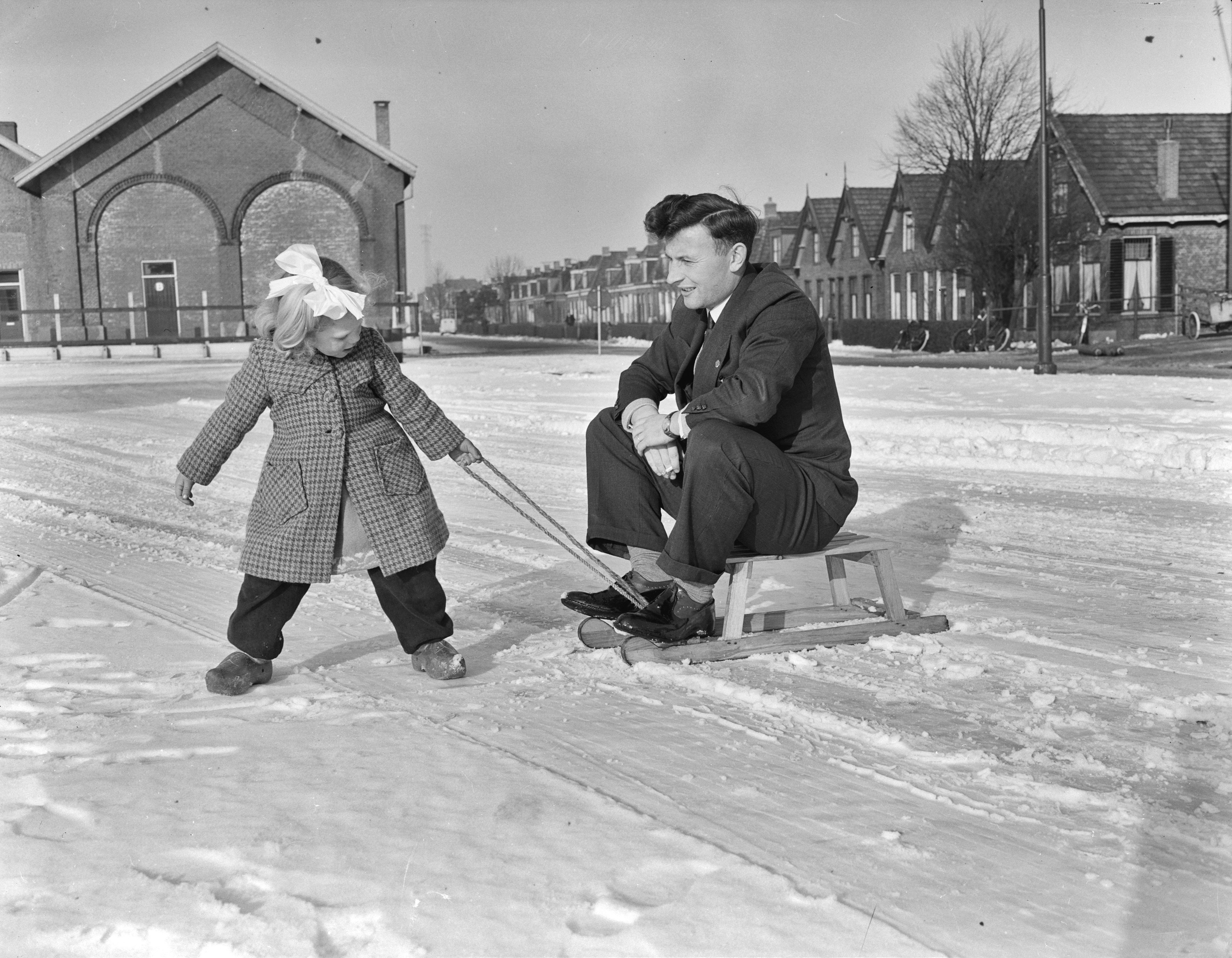 Collectie / Archief : Fotocollectie Anefo Reportage / Serie : [ onbekend ] Beschrijving : Serie bezoek bij Abe Lenstra (familie) Datum : 29 januari 1952 Trefwoorden : FAMILIE, SERIEs, bezoeken Persoonsnaam : Lenstra, Abe Fotograaf : Pot, Harry / Anefo Auteursrechthebbende : Nationaal Archief Materiaalsoort : Negatief (zwart/wit) Nummer archiefinventaris : bekijk toegang 2.24.01.04 Bestanddeelnummer : 904-9528